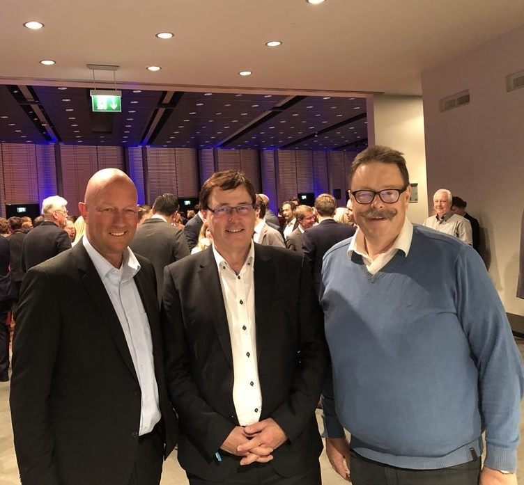 Die ersten drei Kandidaten der Landesliste zur Bundestagswahl 2017 der FDP Thüringen auf dem Bunten Abend vor dem Dreikönigstreffen der Liberalen 2018. V.l.n.r. Thomas L. Kemmerich MdB, Gerald Ullrich MdB, Reginald Hanke (die ersten beiden haben den Einzug in den Bundestag geschafft)